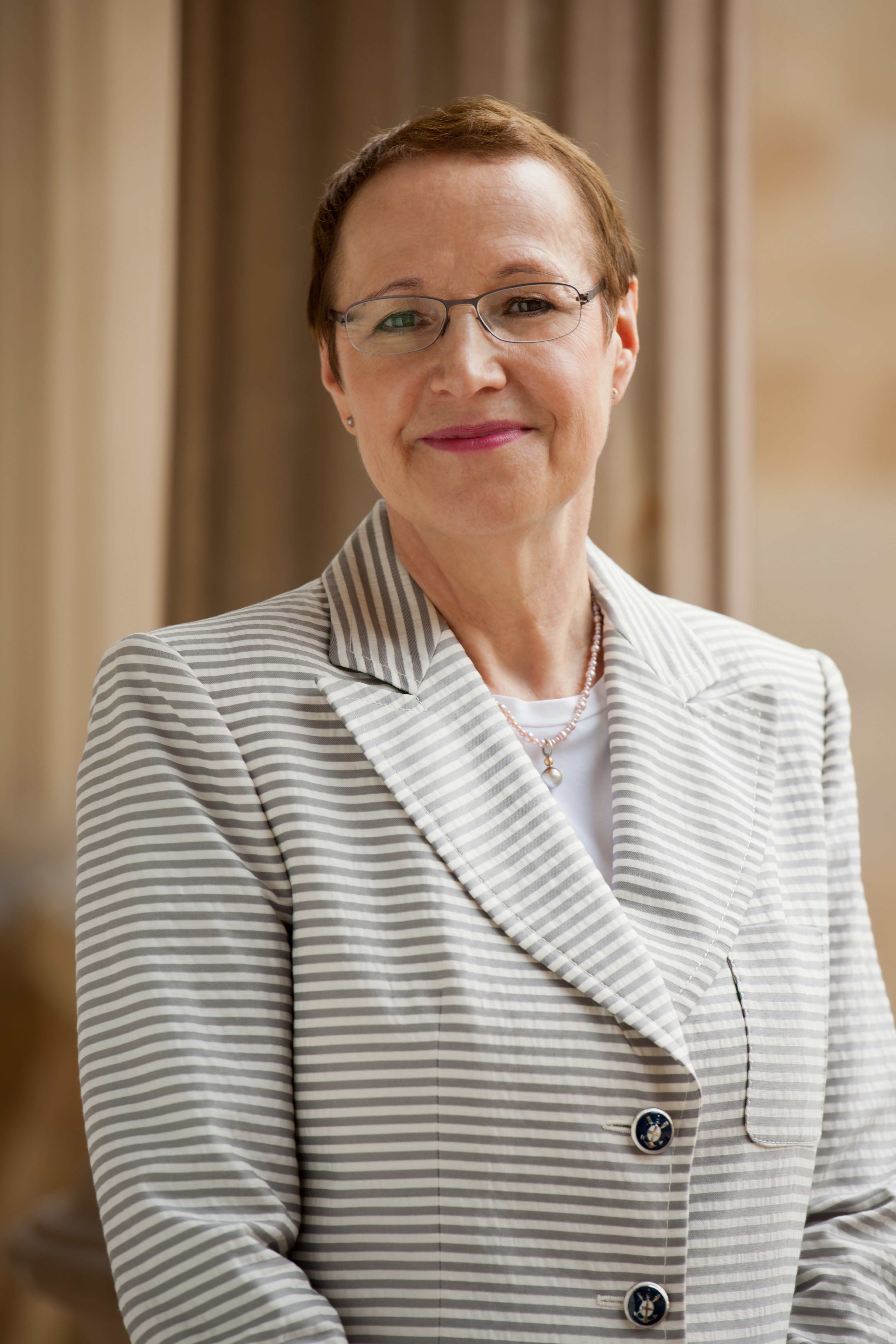 Cornelia Ewigleben ist Direktorin des Landesmuseums Württemberg in Stuttgart, © Hendrik Zwietasch, Landesmuseum Württemberg